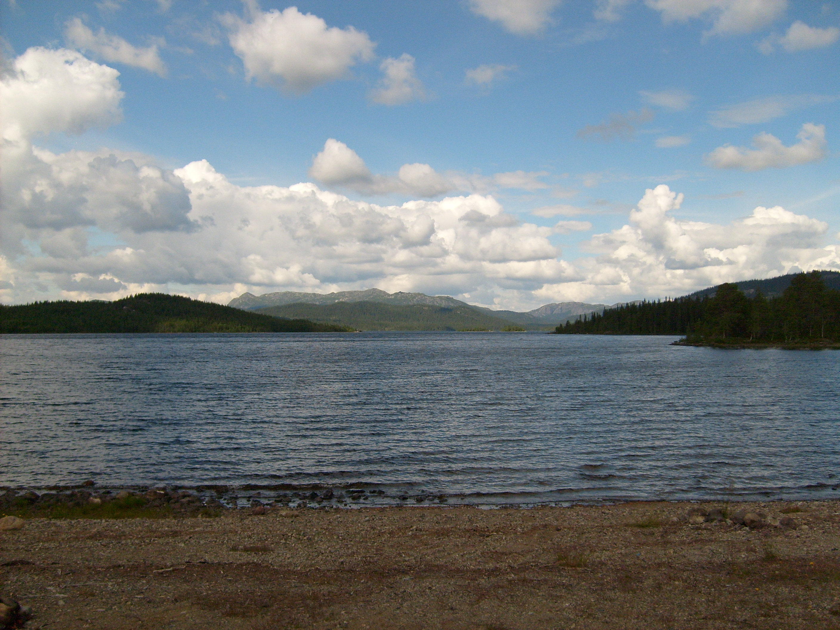 Lakavattnet nära Storåbränna